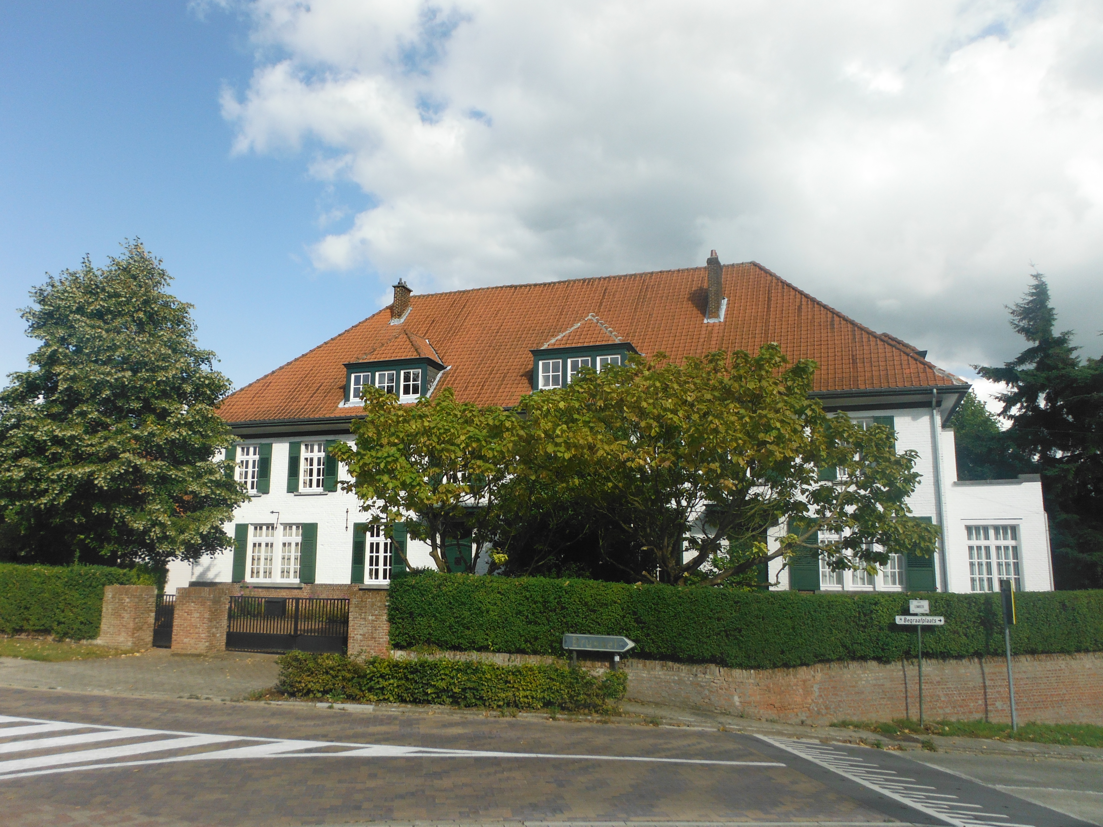 Lindemansscohol, Roosdaal